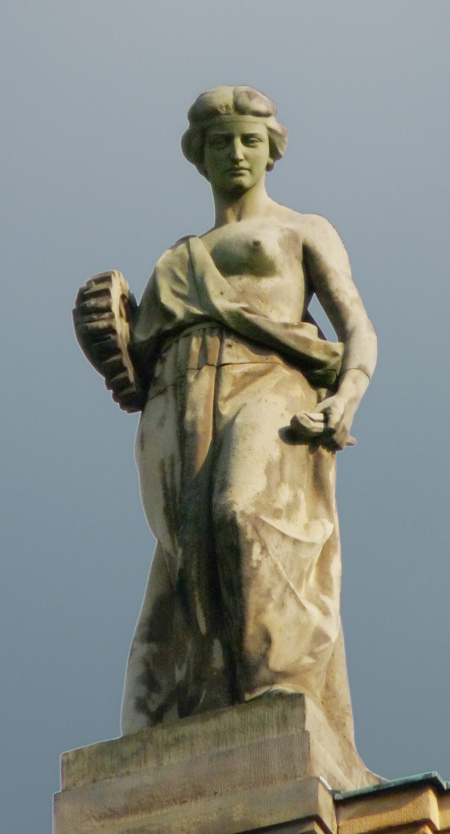 Allegorie der Technik von Theodor Bausch, 3. Attikafigur (von links) auf dem Portikus des Großen Hauses der Staatstheater Stuttgart, 1912.